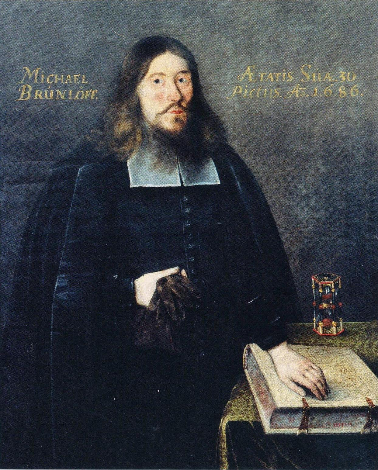 Kalannin kirkkoherra Michael Brunlöff (Mikael Brunlöf), latinankielisen kuvatekstin mukaan 30-vuotiaana.